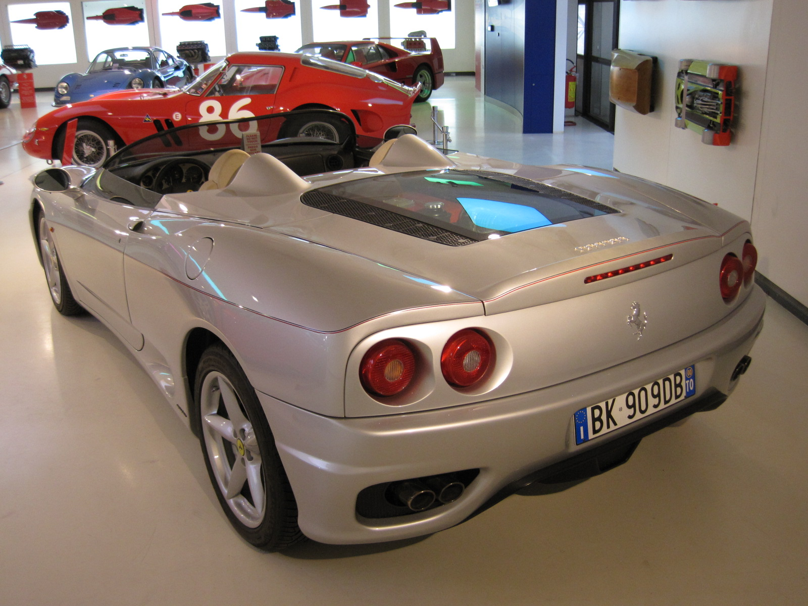 Automobiles in the Galleria Ferrari - Ferrari 360 Barchetta - Modele unique